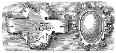 Kartuschen